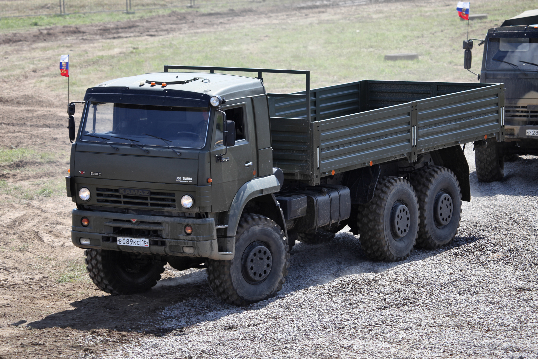 КАМАЗ-65224 (KAMAZ-65224)